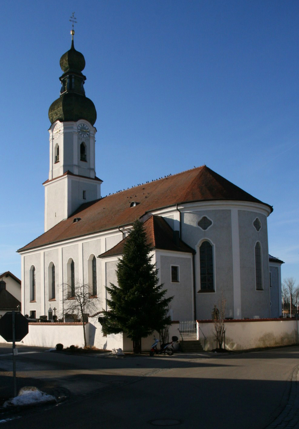 St. Michael, die katholische Pfarrkirche der Gemeinde Mettenheim (Landkreis Mühldorf am Inn, Oberbayern). Der barocke Kirchenbau wurde 1720 geweiht. Die Saalkirche besitzt einen Turm mit doppelter Zwiebelhaube auf der Vorderseite und einen halbrunden Chor auf der Rückseite, wo zwei seitliche kleinere Anbauten u.a. die Sakristei aufnehmen. Der prachtvolle Innraum verfolgt gleichfalls konsequent die barocke Formensprache. Der Hochaltar im Chor, zwei Nebenaltäre rechts und links des Chores, eine Kanzel und eine zweistöckige Orgelempore, alle barock gestaltet, bedeuten die Haupteinrichtung.